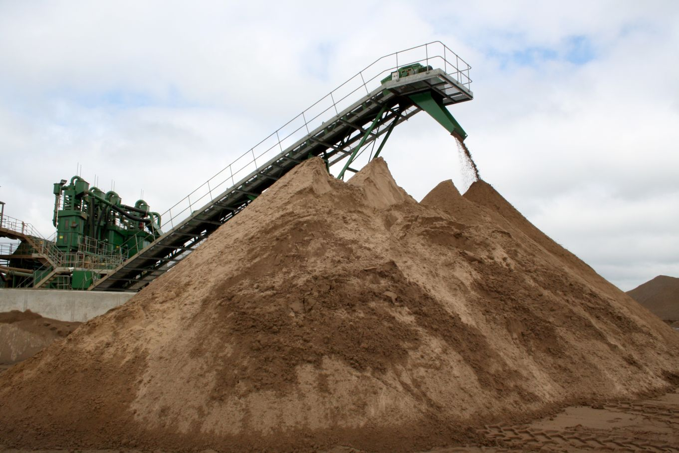 Sand stockpiles